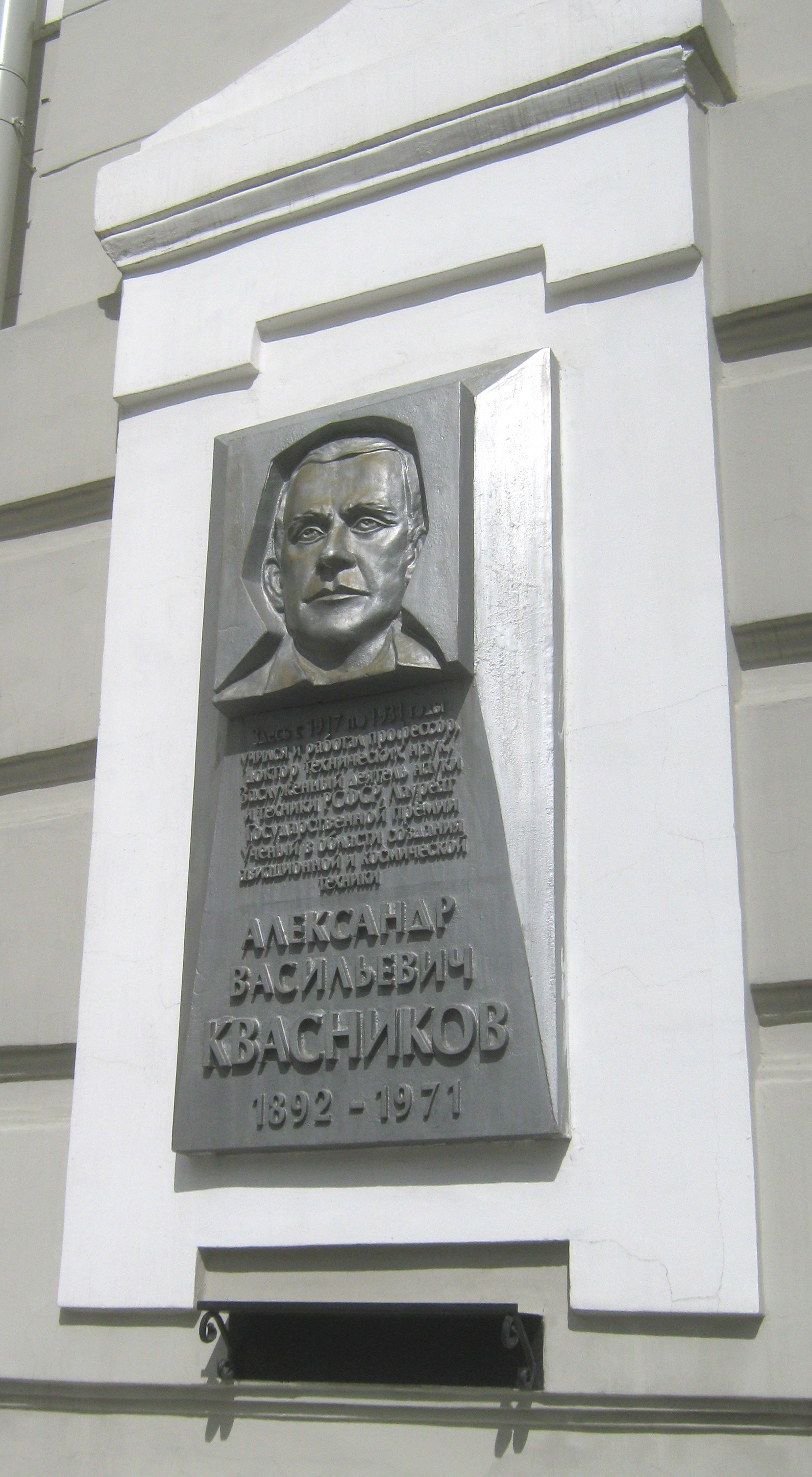 Проспект Ленина 30а, Томск